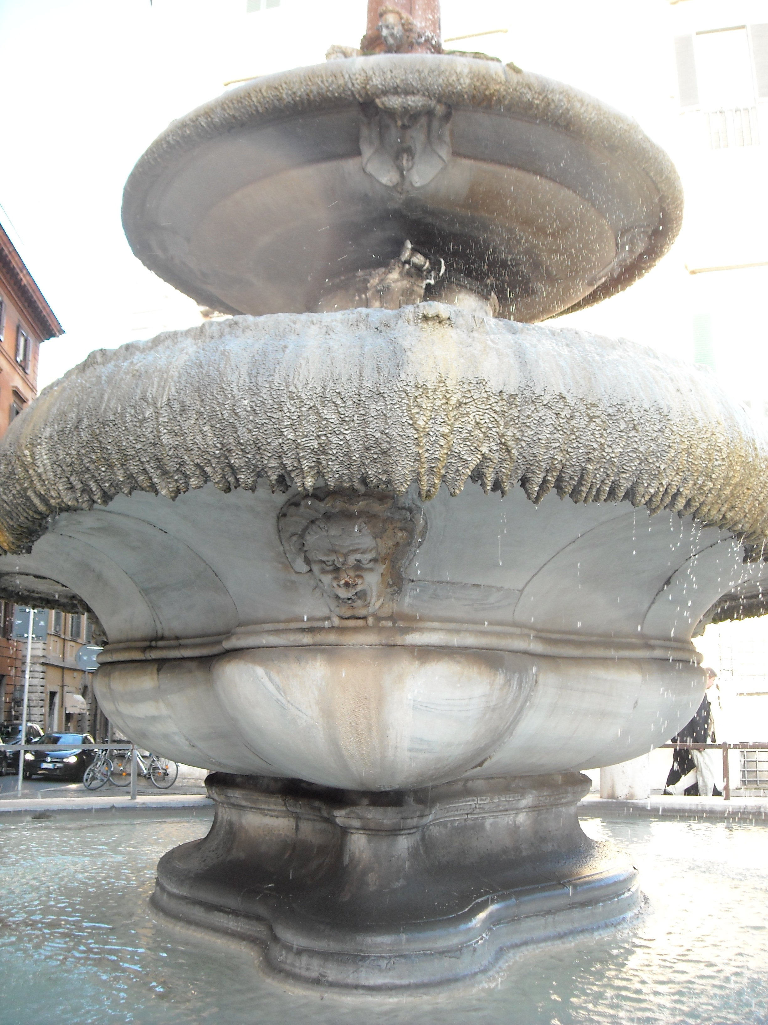 La fontana di piazza dell'Aracoeli - Vista dei mascheroni